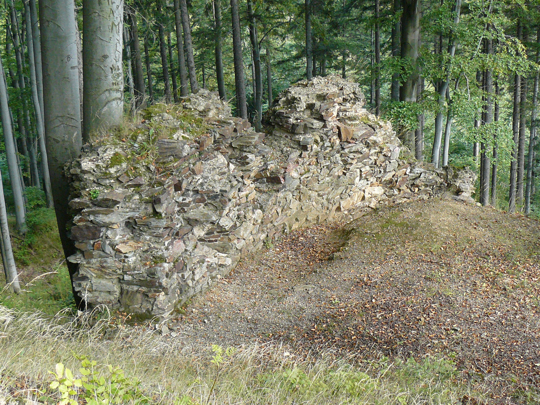 Zřícenina hradu Edelštejn na Zámeckém vrhu u Zlatých Hor